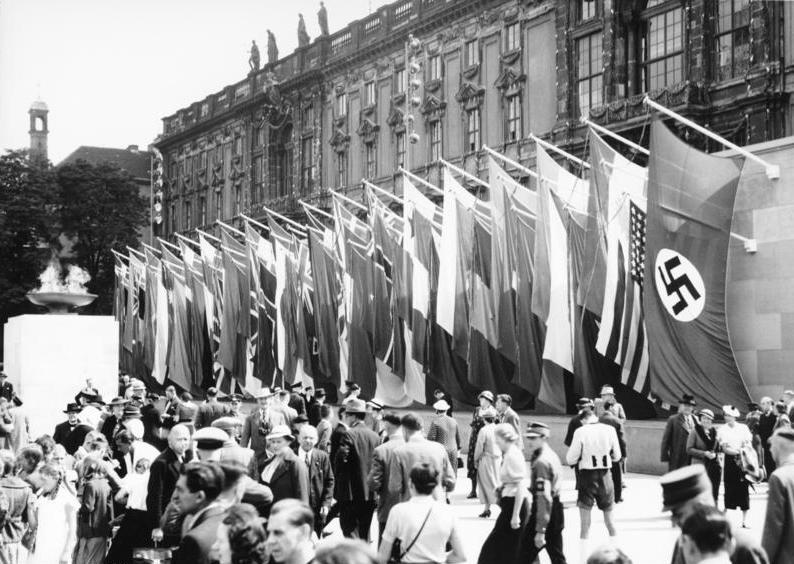 Berlin Olympiade 1936 - vor dem alten Schloß (Lustgartenseite)